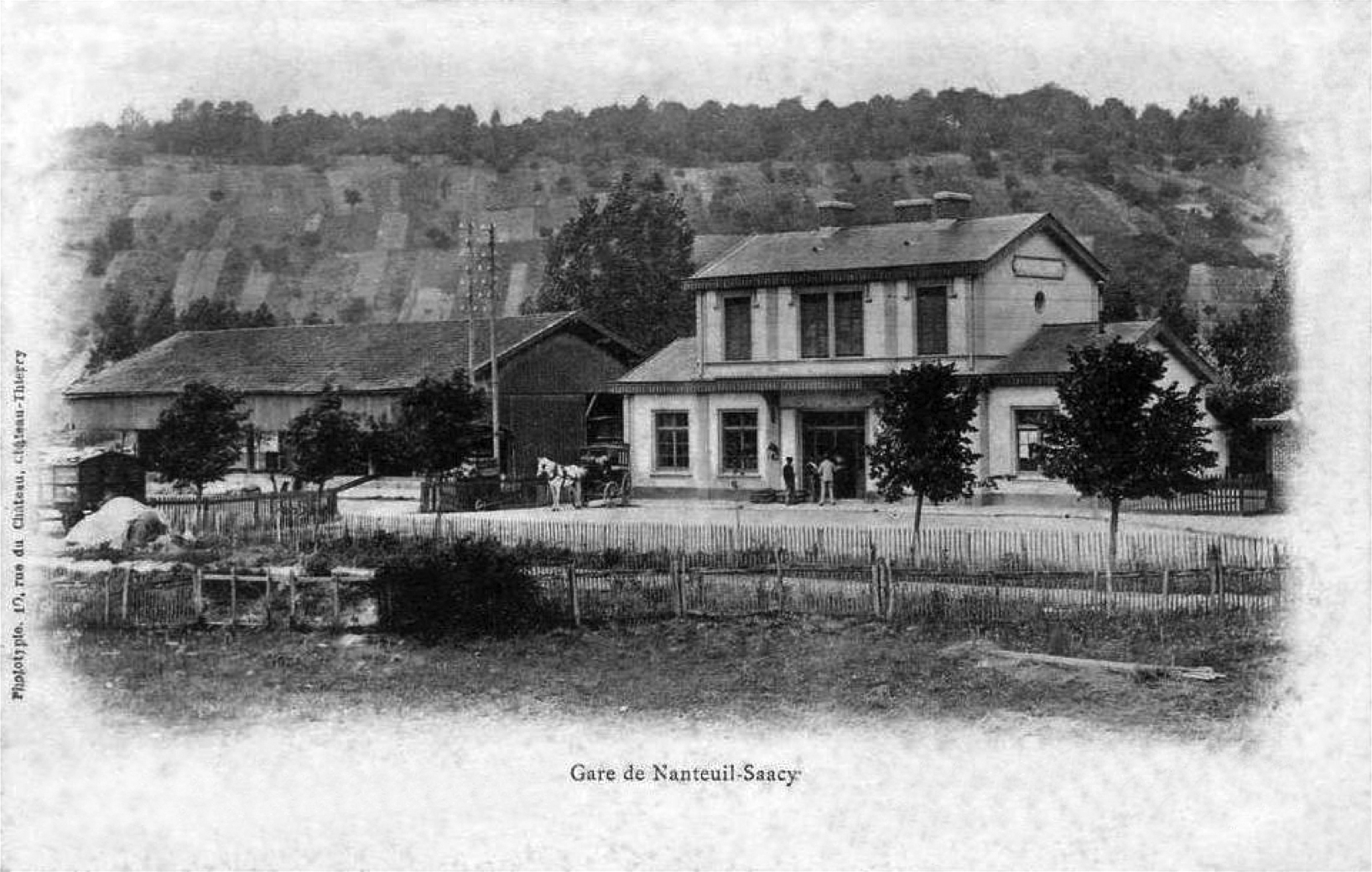 L'extérieur de la gare de Nanteuil - Saacy avec le bâtiment voyageurs et la halle à marchandise